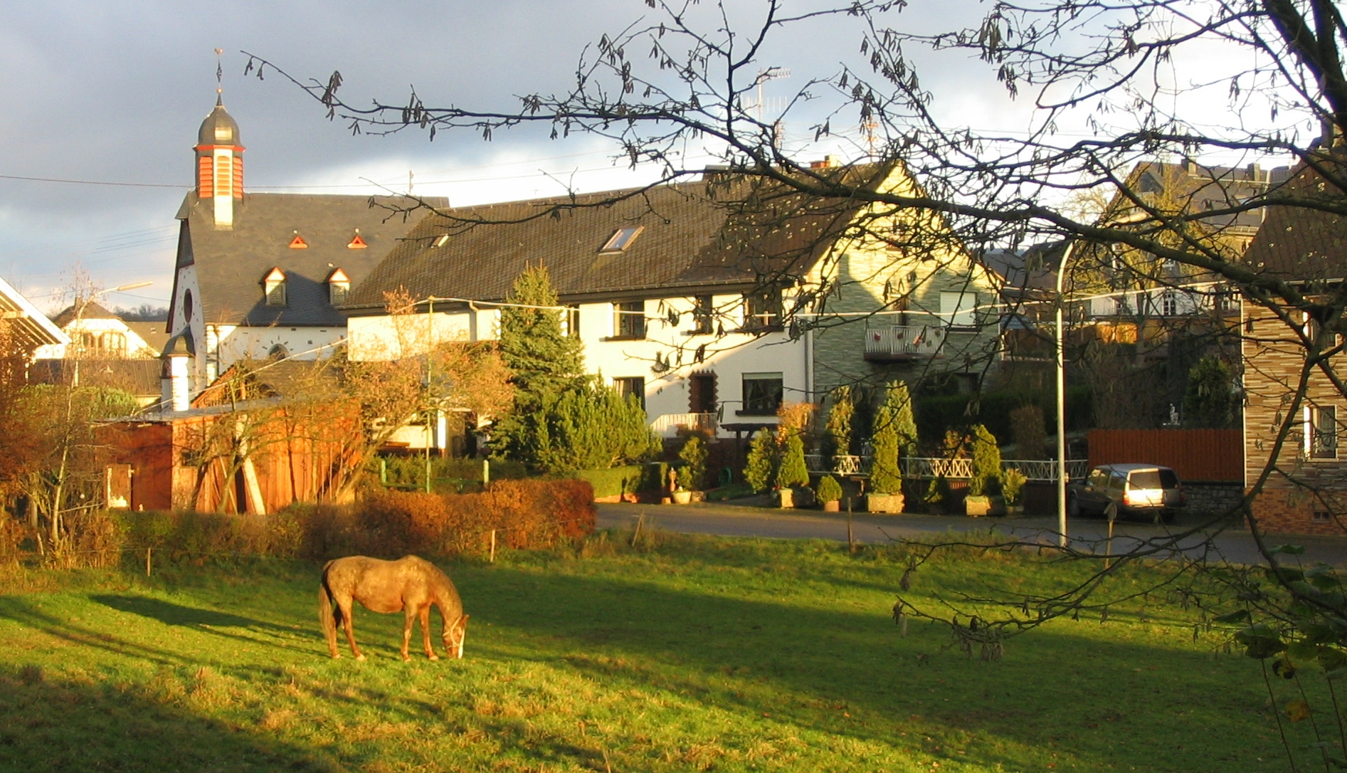 Tiefenbach im Hunsrück, Ortszentrum am Brühlbach